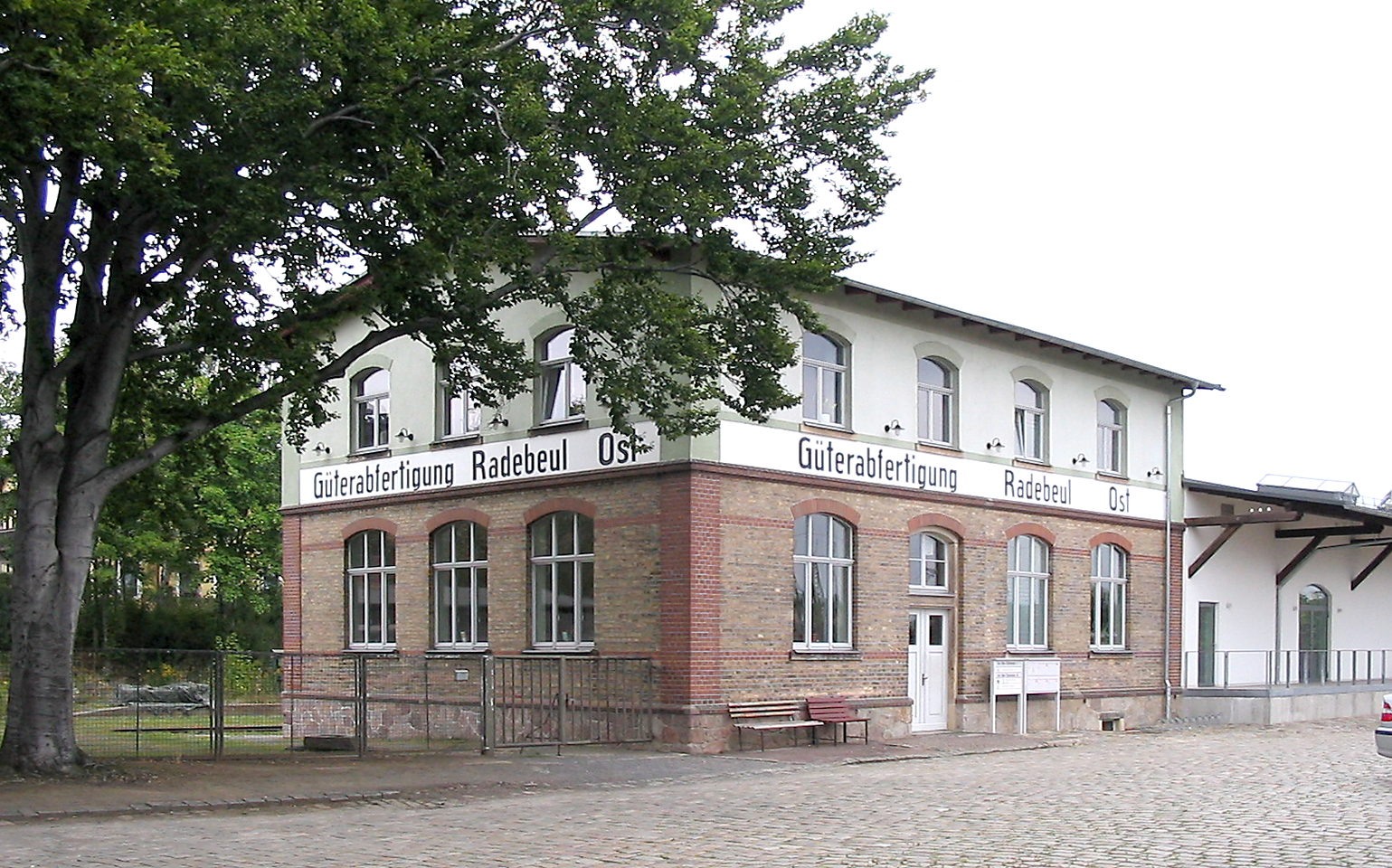 Bahnhof Radebeul Ost: Alter Güterboden; Kopfbau, rechts Halle. Radebeul, Sachsen, Deutschland.